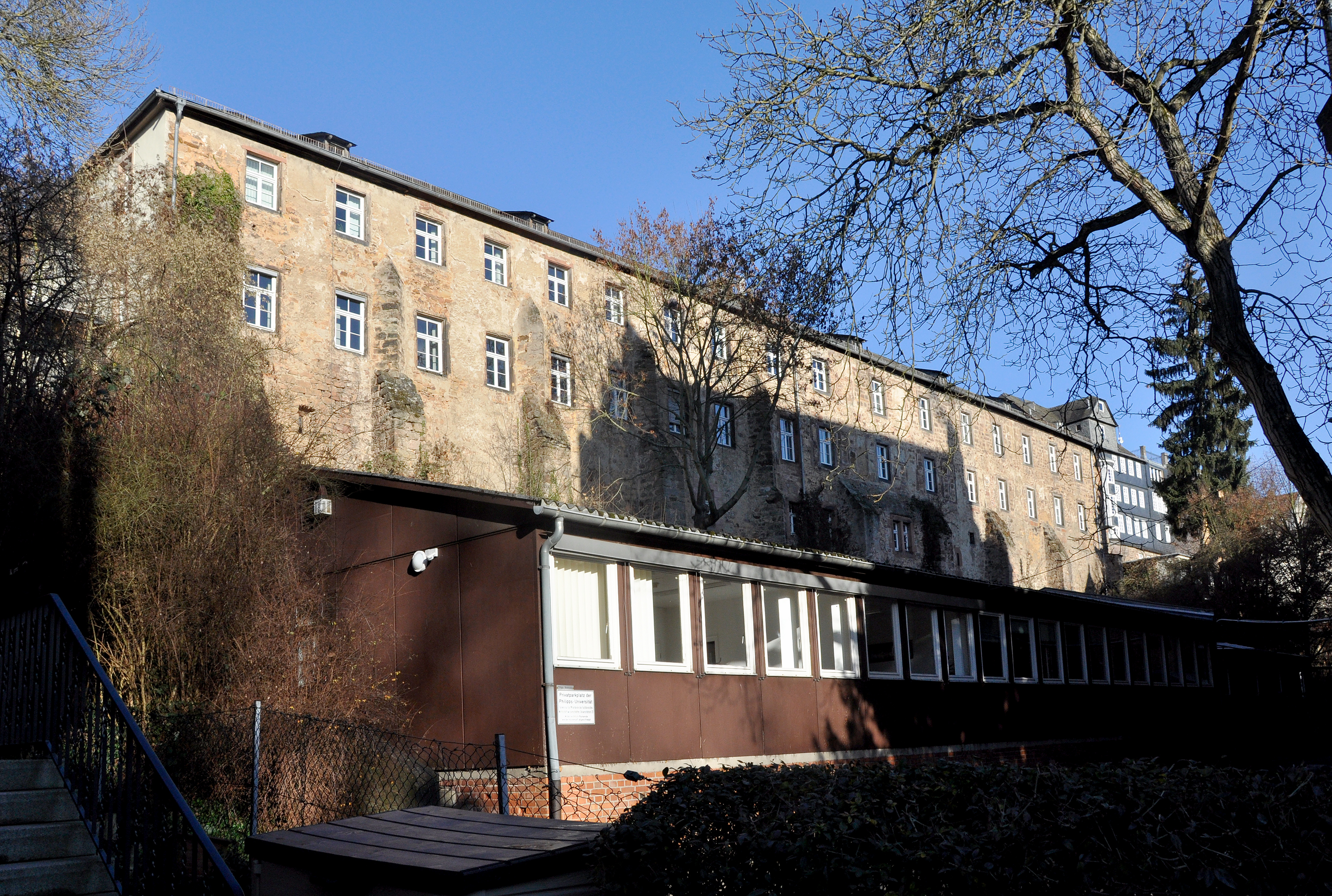 Südflügel des ehemaligen Franziskanerklosters in Marburg. Ansicht von Südwesten.